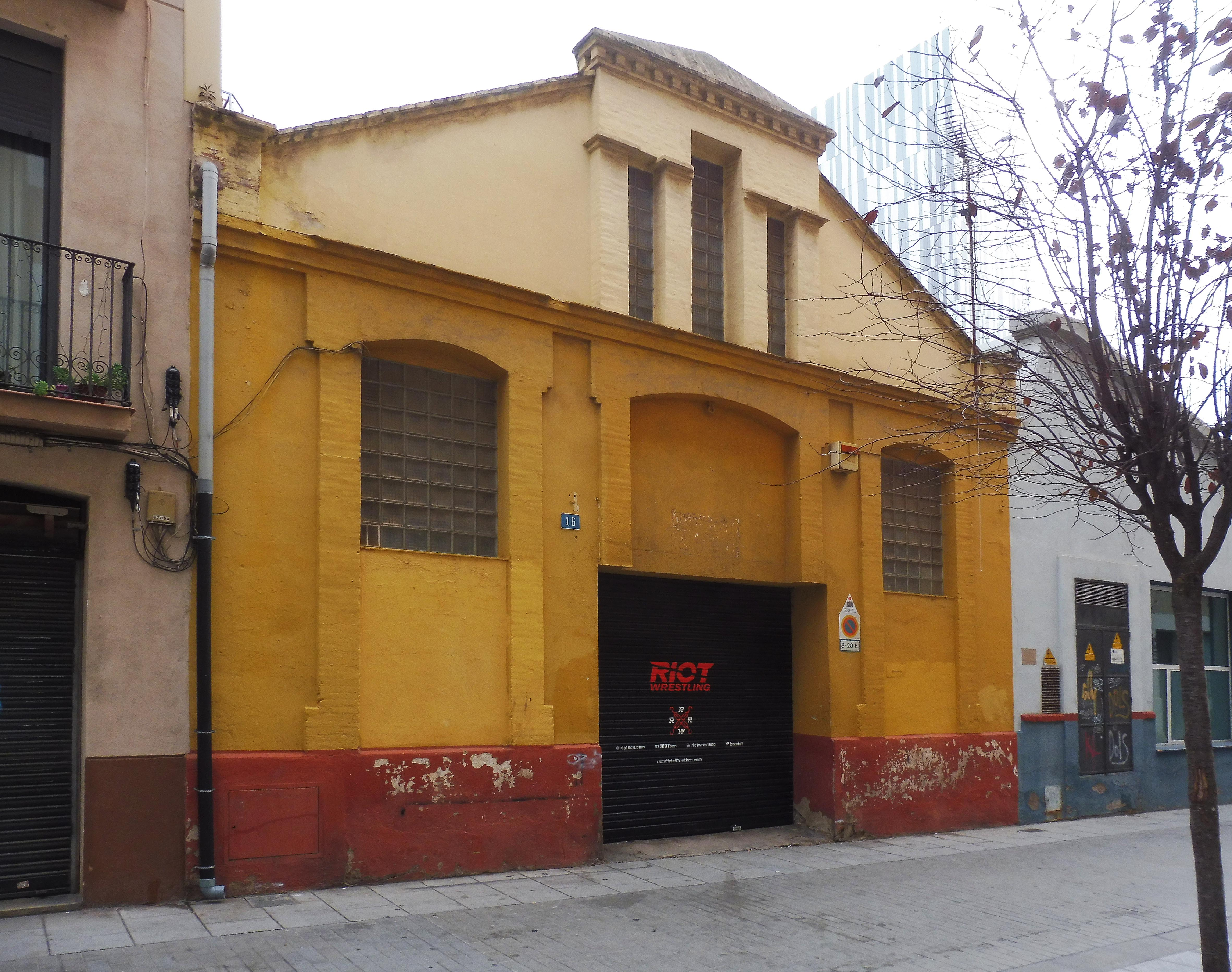 1930-Passarge Vintró 16. Veà (Josep), manufactura de plantilles. 1936-Passatge Vintró 16. Boada Santaló (Joan), deixalles de blat, salvat i grans. 1945-Passatge Vintró 16. Manauta (Josep), magatzem de pinsos. 1961-Passatge Vintró 16. Tallers Adra Navarro Stat. Limitada, torneria mecànica. 2019-Passatge Vintró 16. Riot Wrestling, un club de lluita lliure.